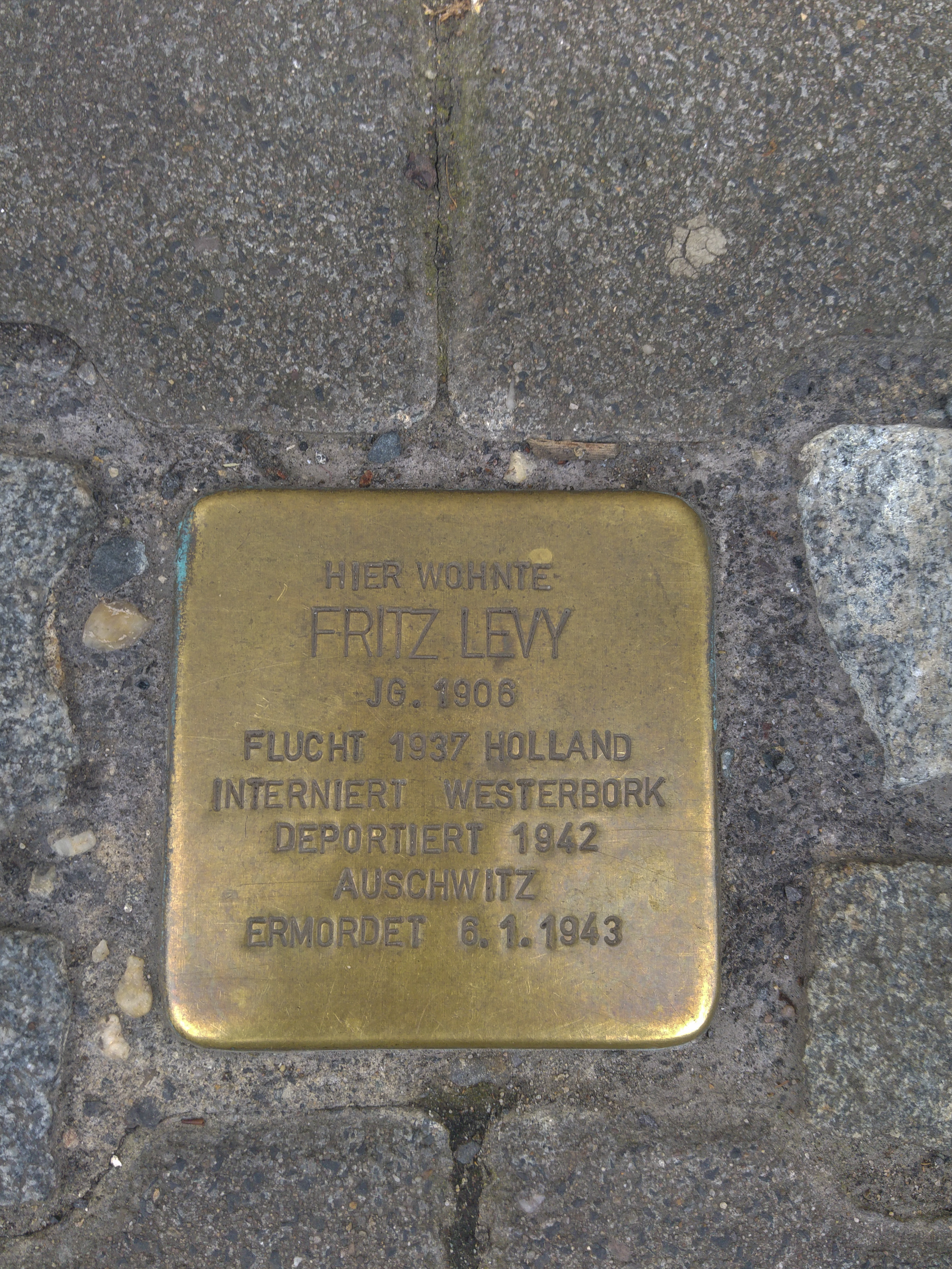 Stolperstein für Fritz Levy (verlegt 2019), Siegburger Straße 18, Bonn-Beuel-Ost